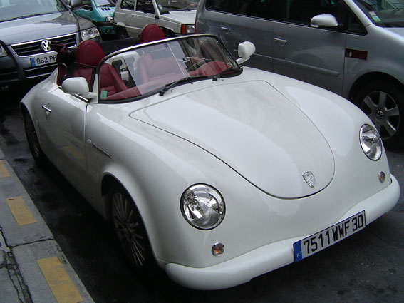 PGO Speedster kitcar.